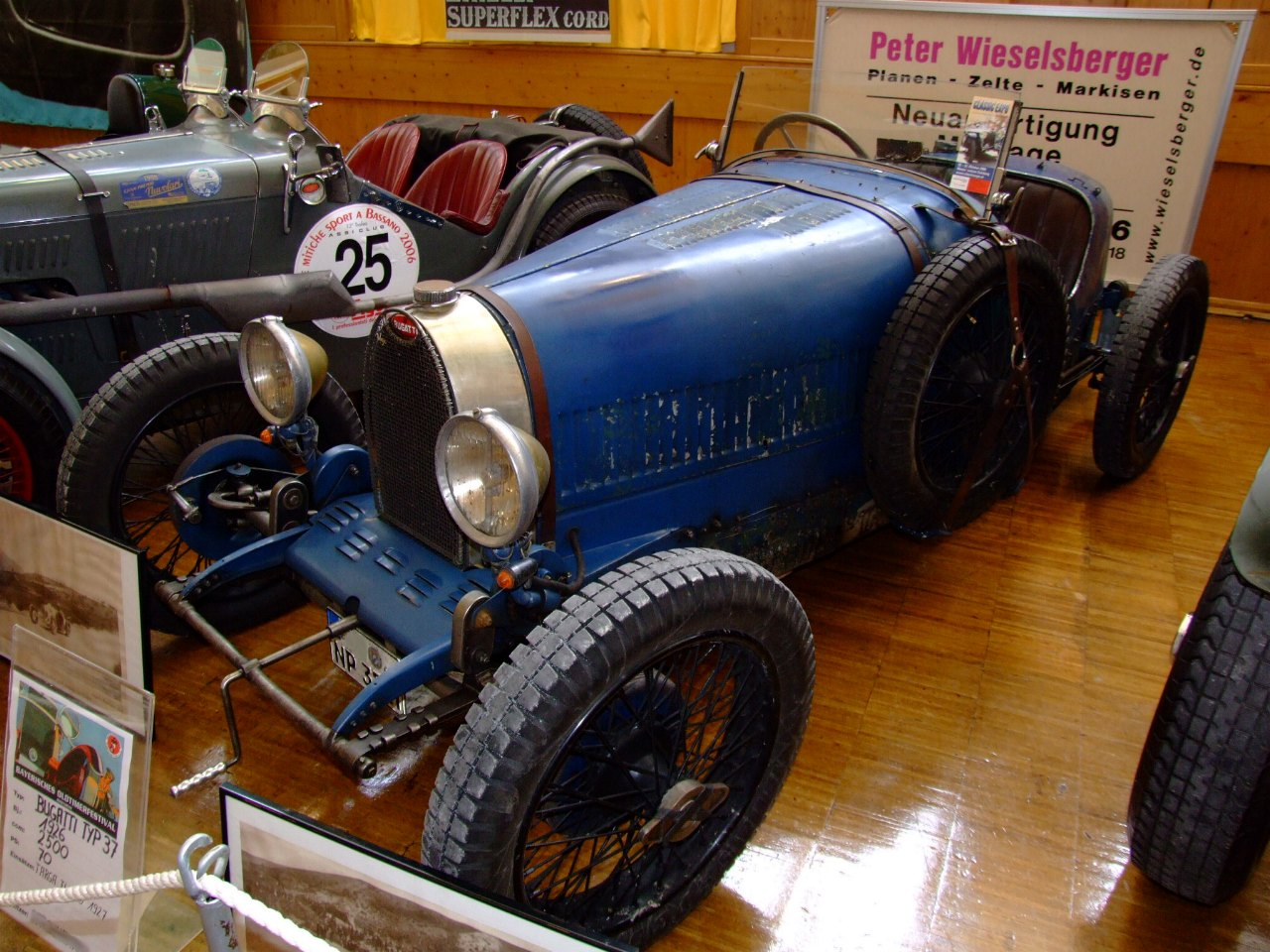 Bugatti Type 37 2500 ccm 70 PS 1926